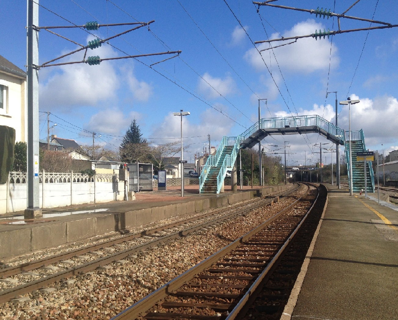 Gare d'Angers-Maître-École-2016